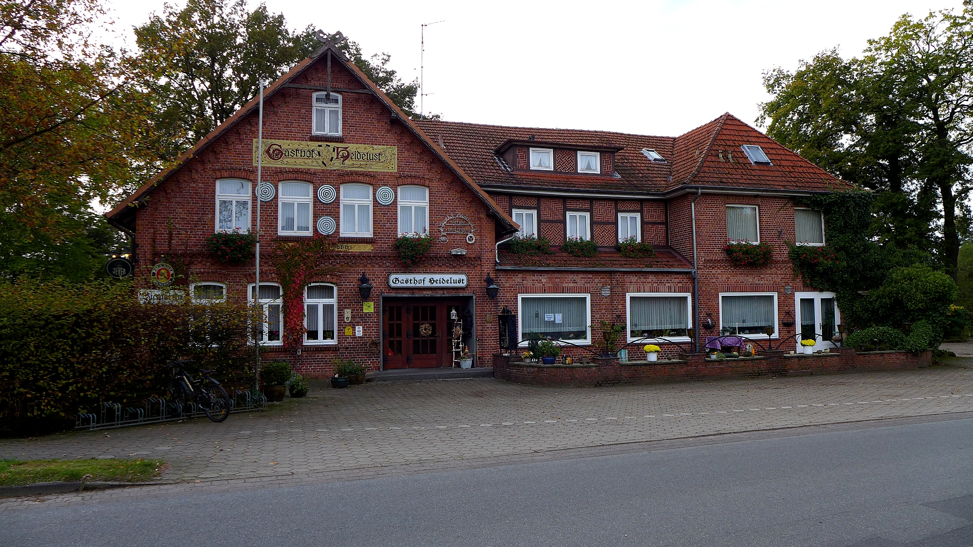 Gebäude aus 1889 in Wesel bei Undeloh, familiengeführter Gasthof Heidelust in 4. Generation.